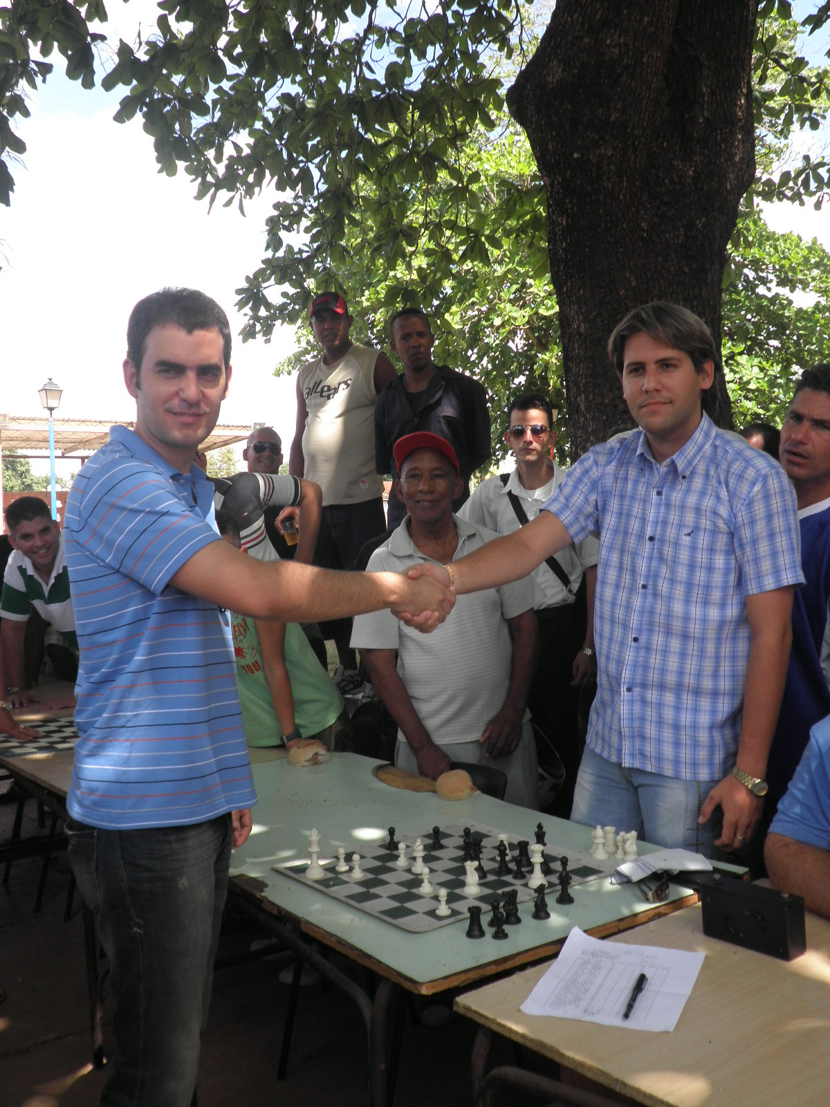 Leinier Dominguez (Izquierda) y Pedro Luis Garcia (Derecha)